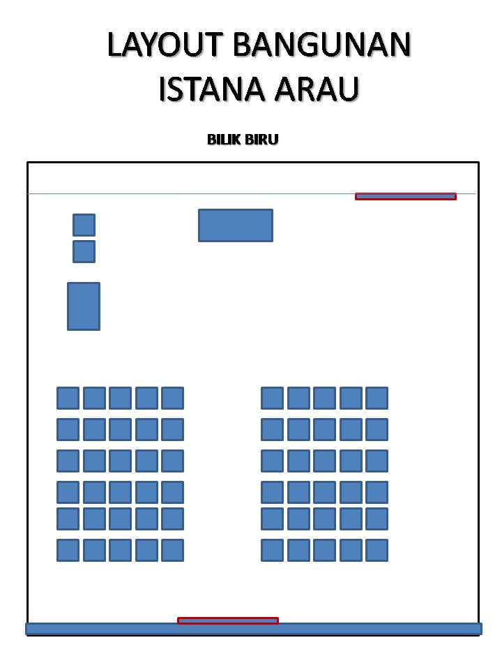 UPACARA RESMI KHAS